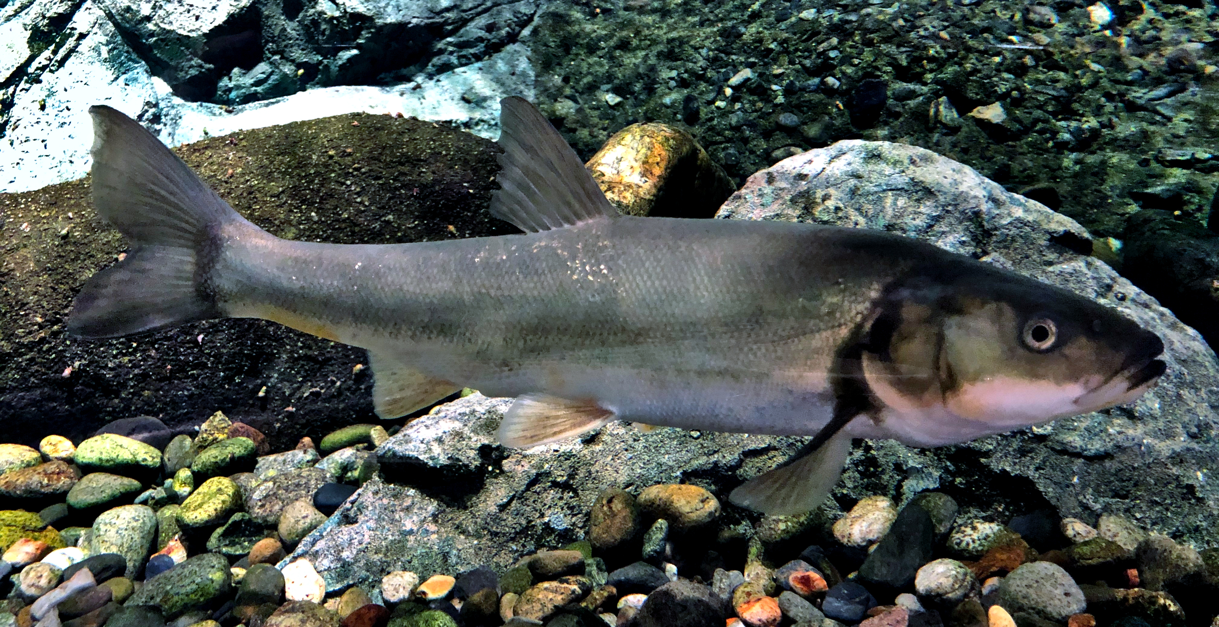 ウケクチウグイ。新潟市水族館 マリンピア日本海飼育展示個体。